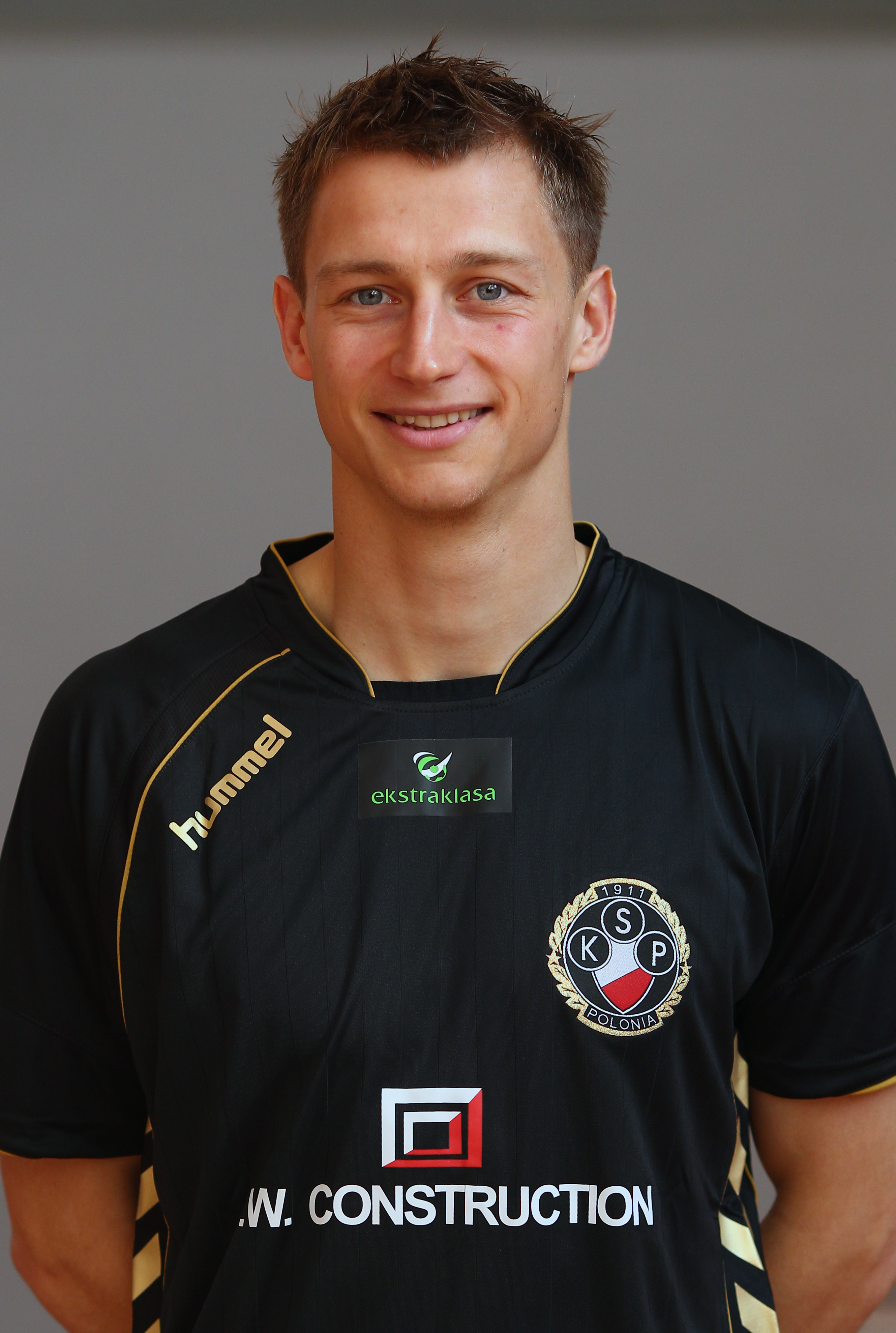 Daniel Gołębiewski, player of Polonia Warszawa (2011)